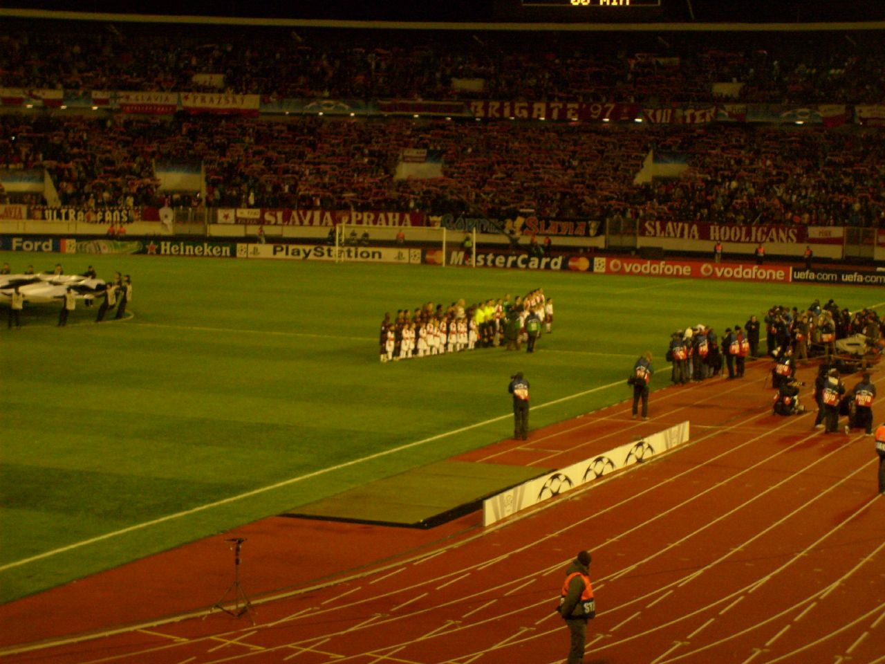 Arsenal & Slavia line up